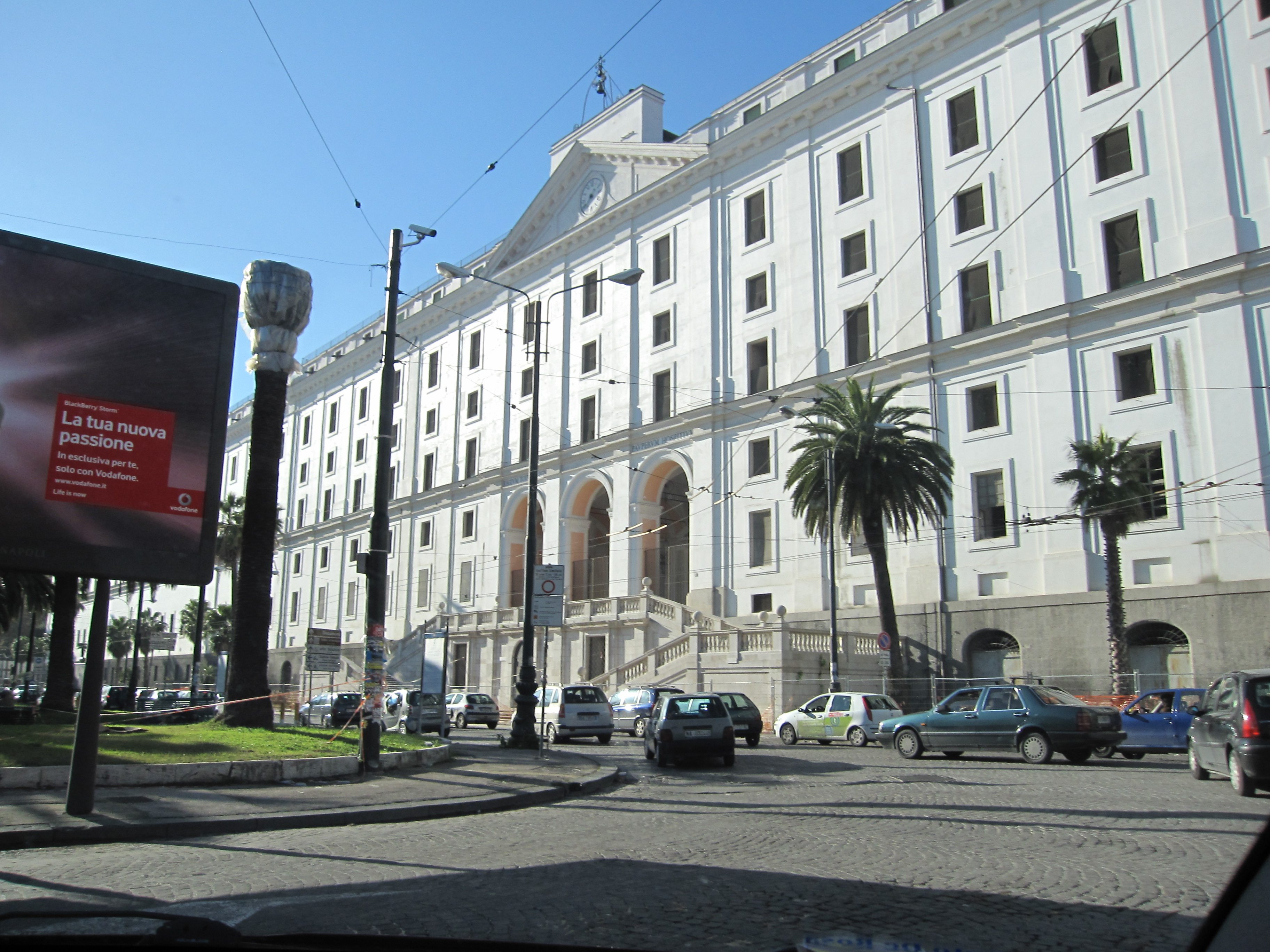 In Piazza Carlo III, Real Albergo dei Poveri - Napoli